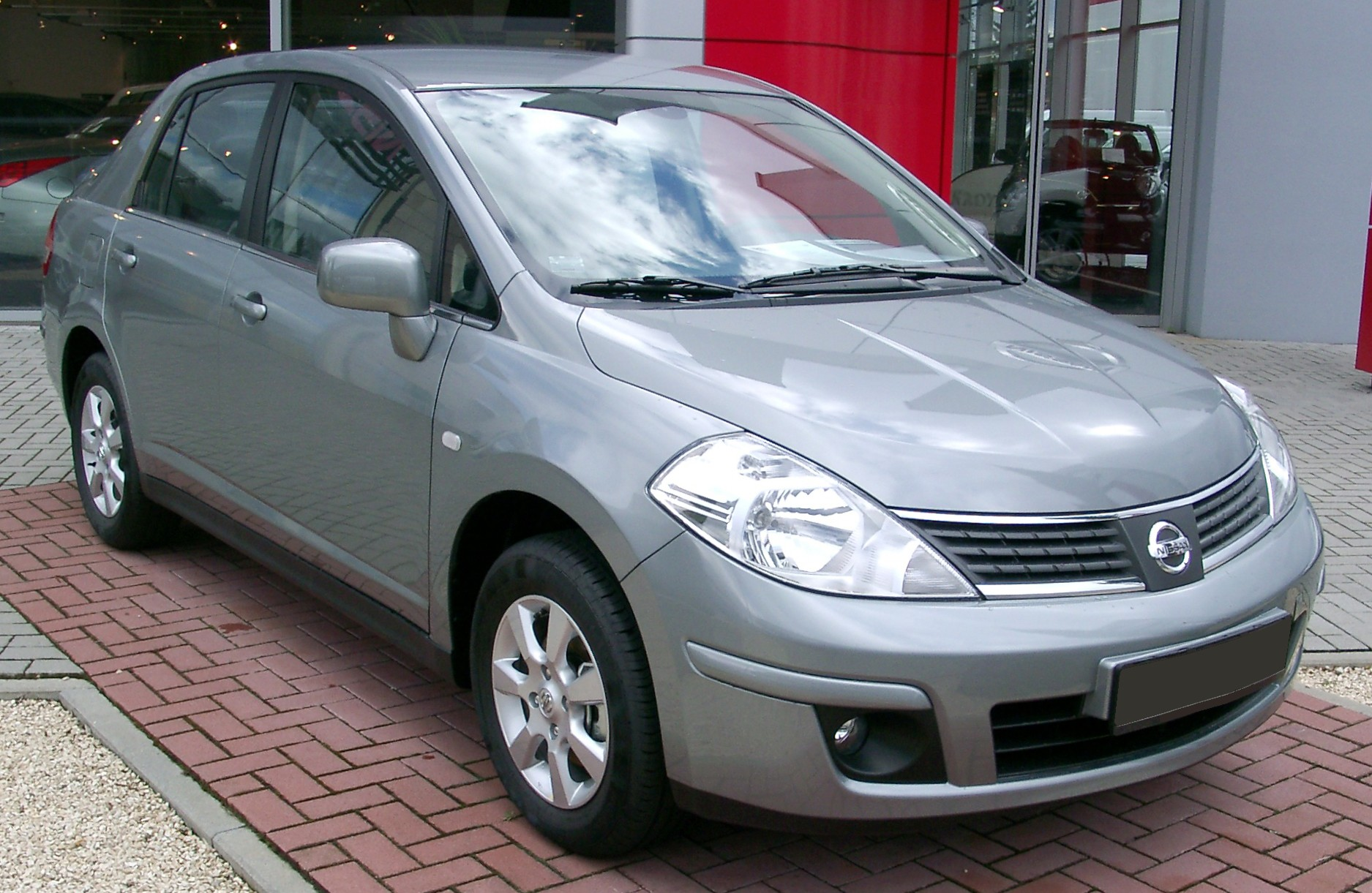 Nissan Tiida